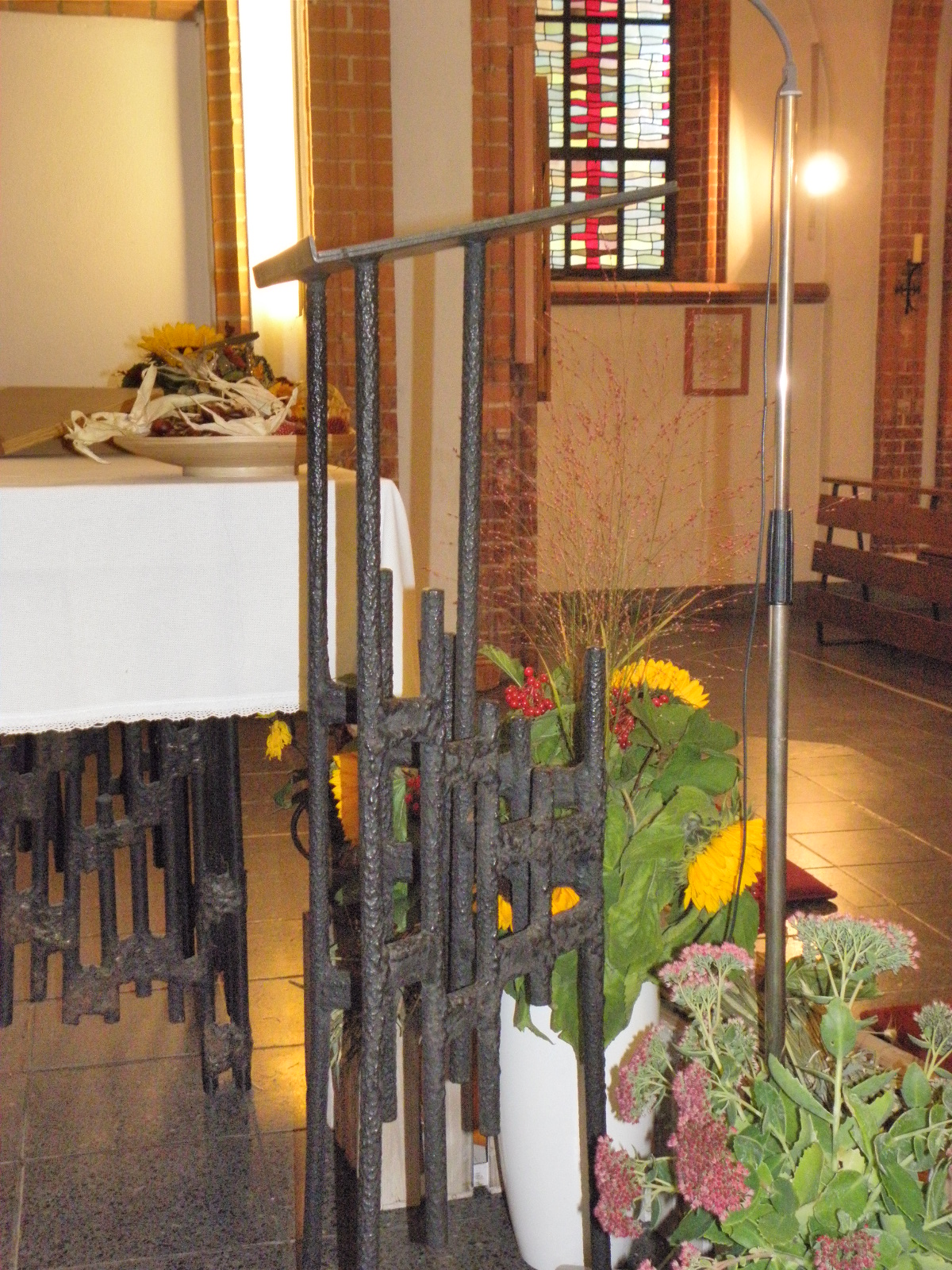 Kath. Kirche St. Peter und Paul in Eberswalde, Ambo